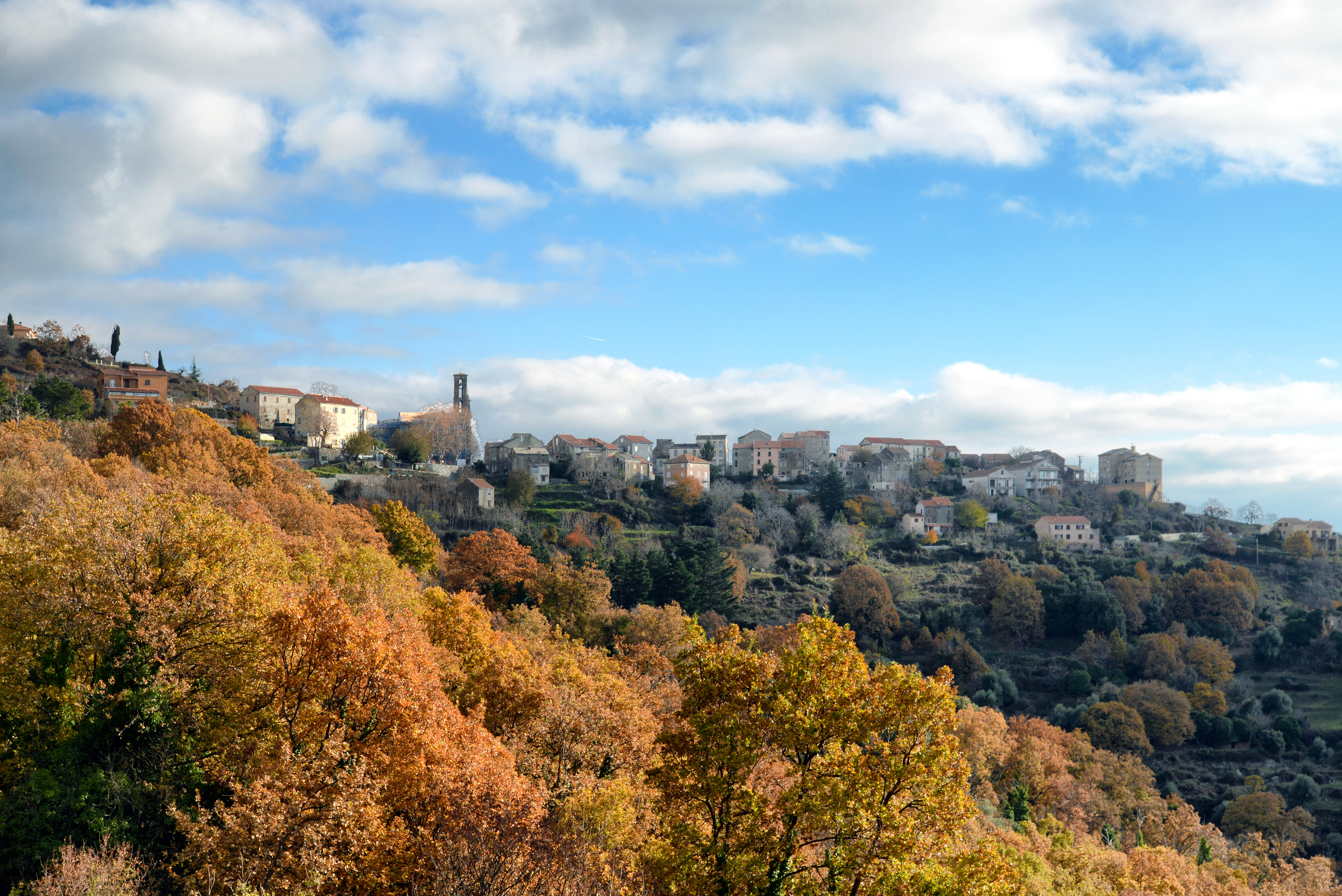 Piedicorte-di-Gaggio, Rogna (Corse) - Panorama du village